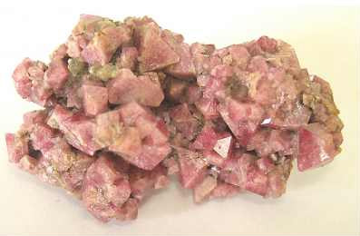 minerał; spinel, pochodzenie Wietnam, autor zdjęcia Ewa Jastrzębska 15.06.2006r.